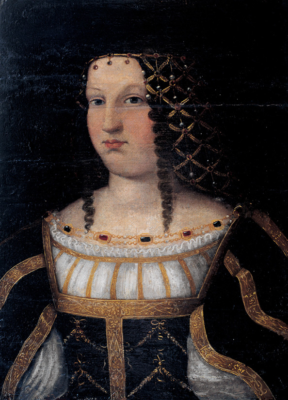 Copia da Bartolomeo Veneto